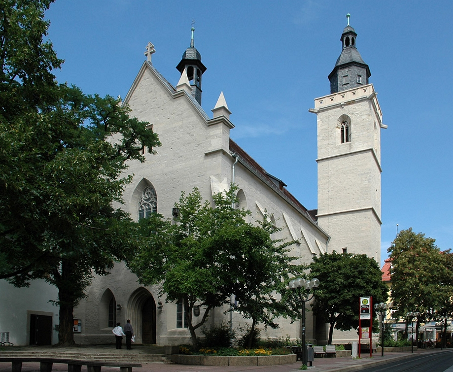 Wigbertikirche (errichtet um 1233) in der Regierungsstraße in Erfurt